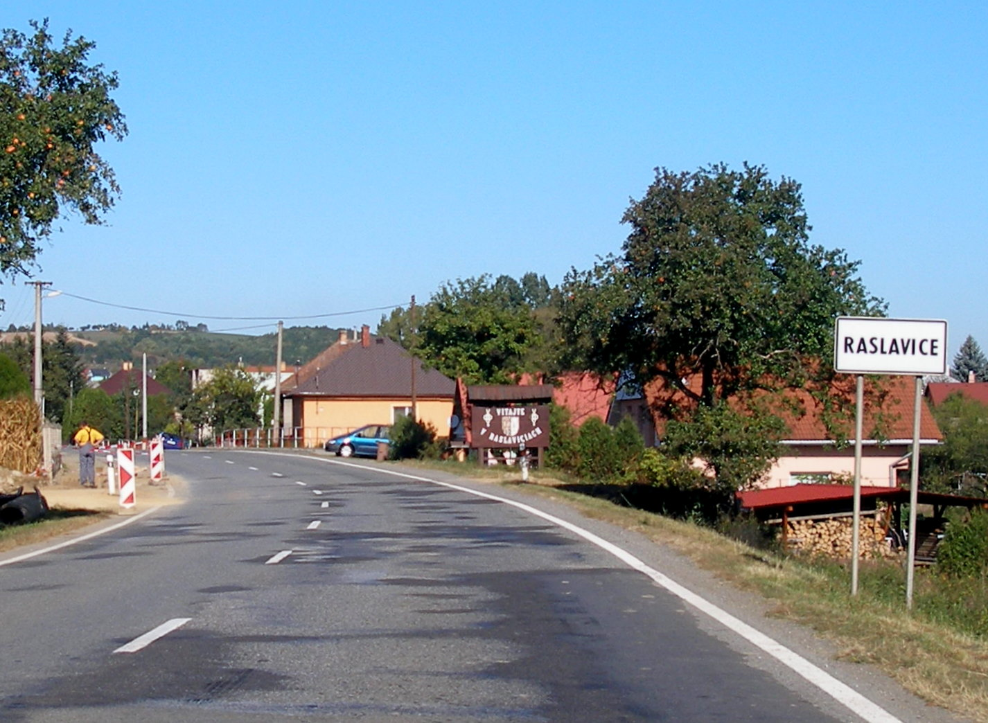 Obec Raslavice okres Bardejov